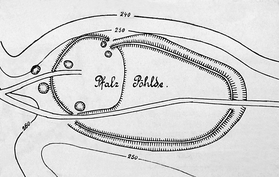 Wallburg Pöhlde, Skizze auf einem Schild neben der Anlage